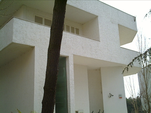 Casa museo Remo Brindisi This is a photo of a monument which is part of cultural heritage of Italy.